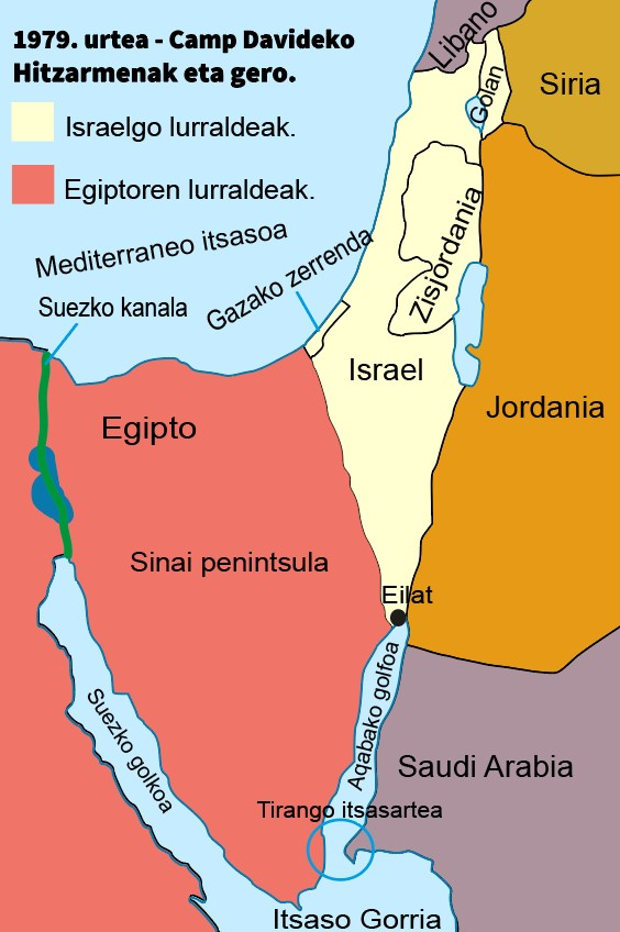 Camp Davideko Hitzarmenak eta gero adostutako mugak.